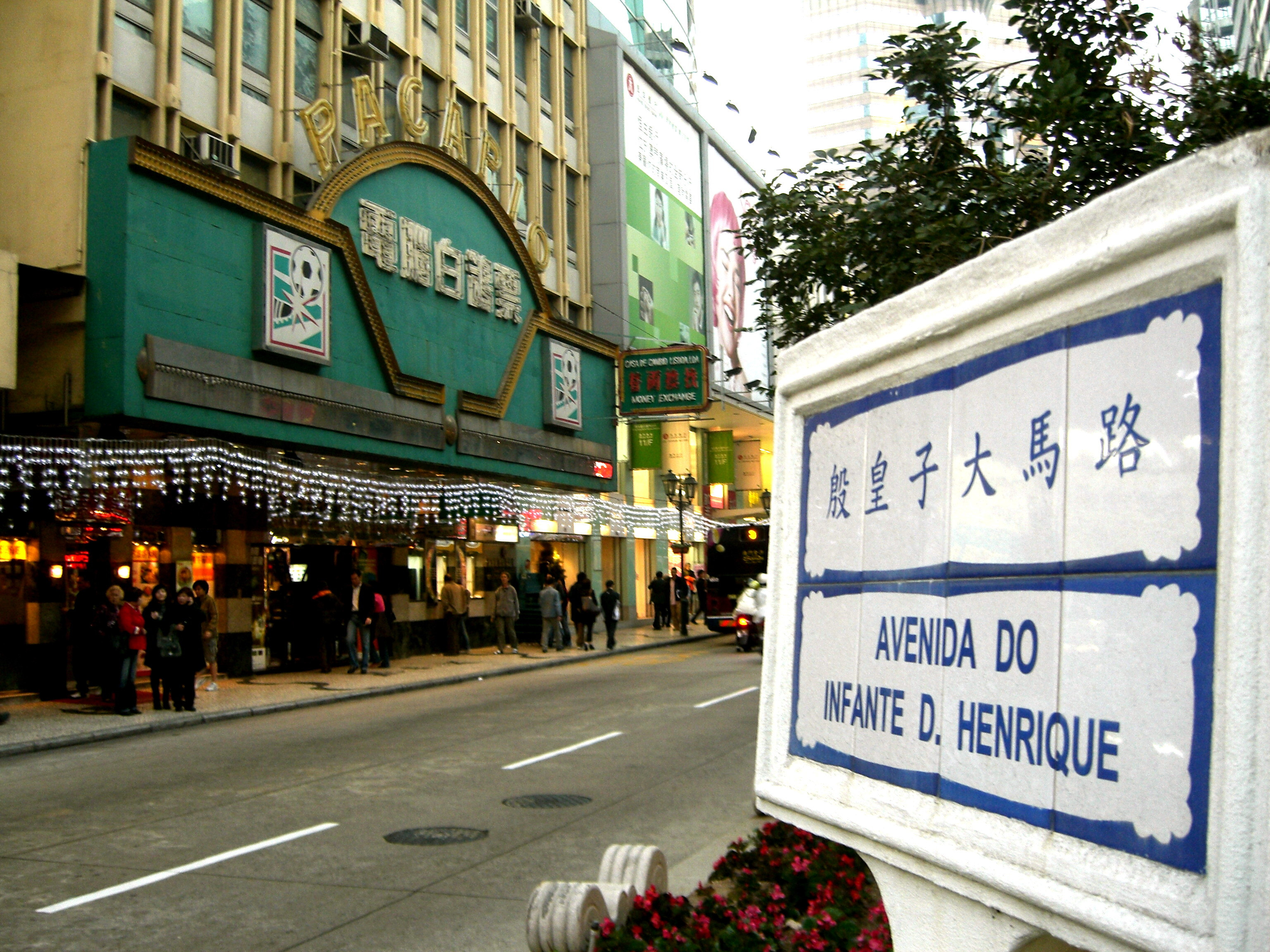 殷皇子大馬路